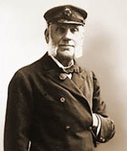 Svenske "snuskungen" Knut Ljunglöf